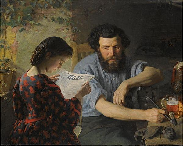 Jakub Husnik (1837-1916). Czech painter, art teacher